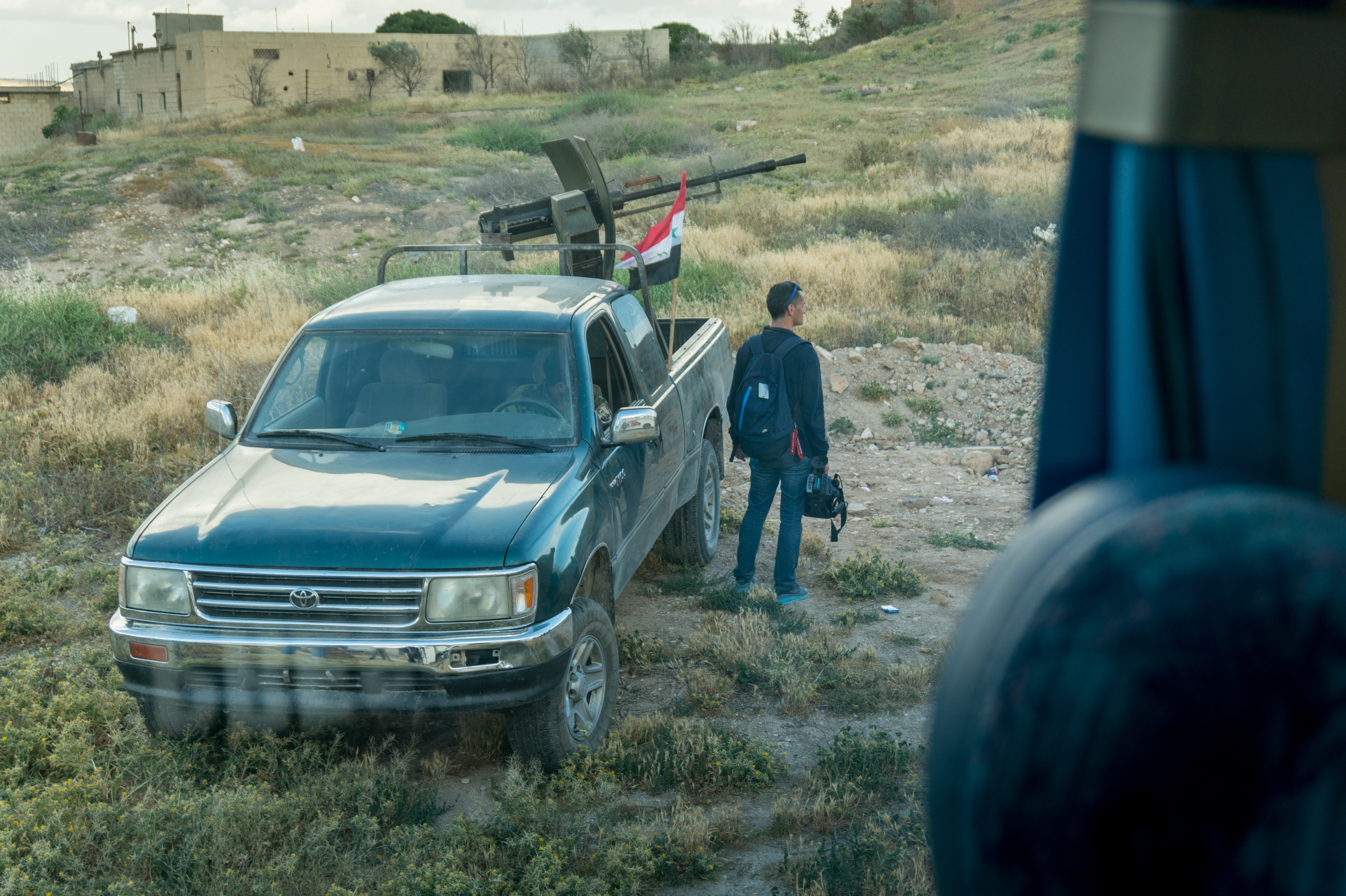 Syria